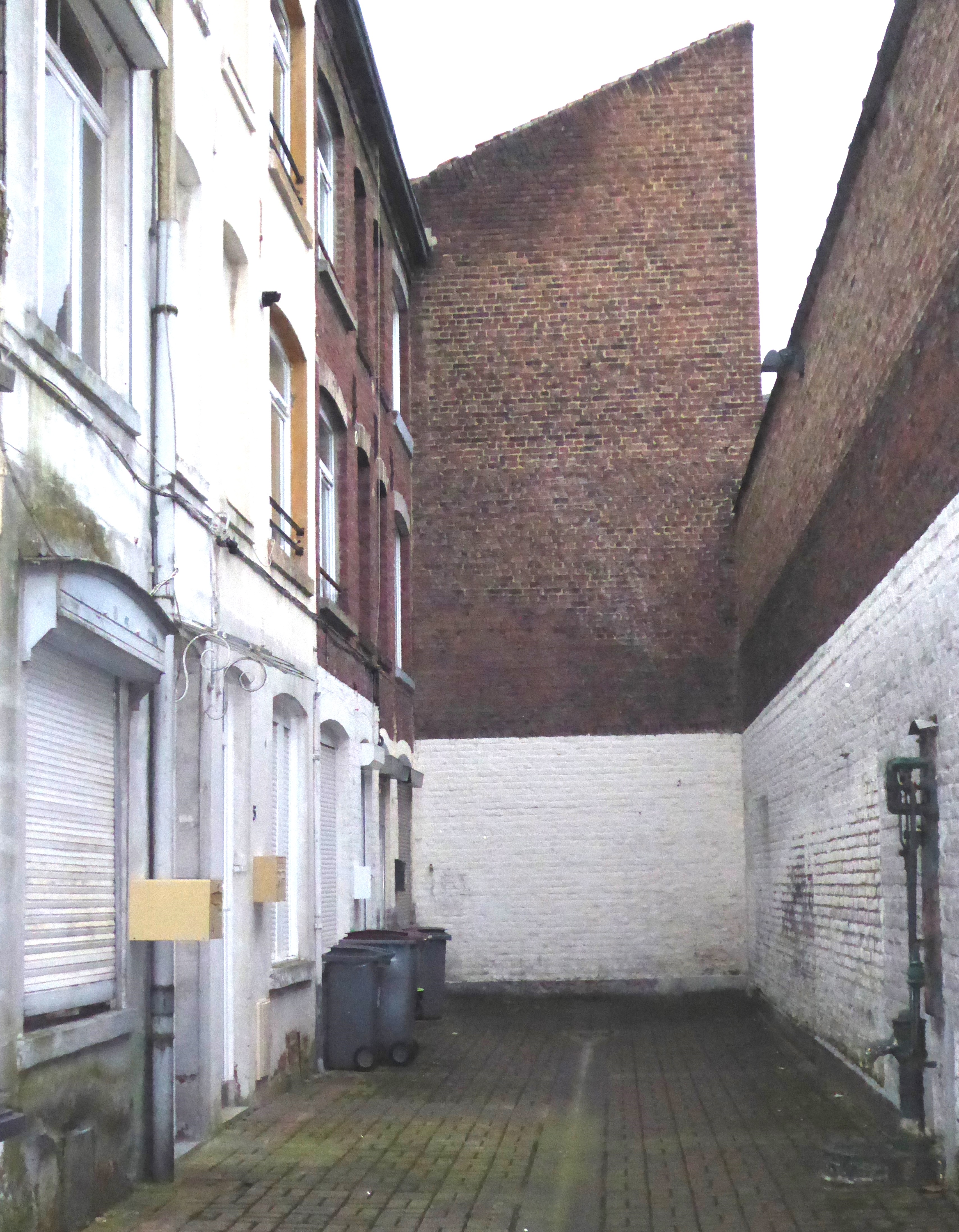 Courée rue Fernig